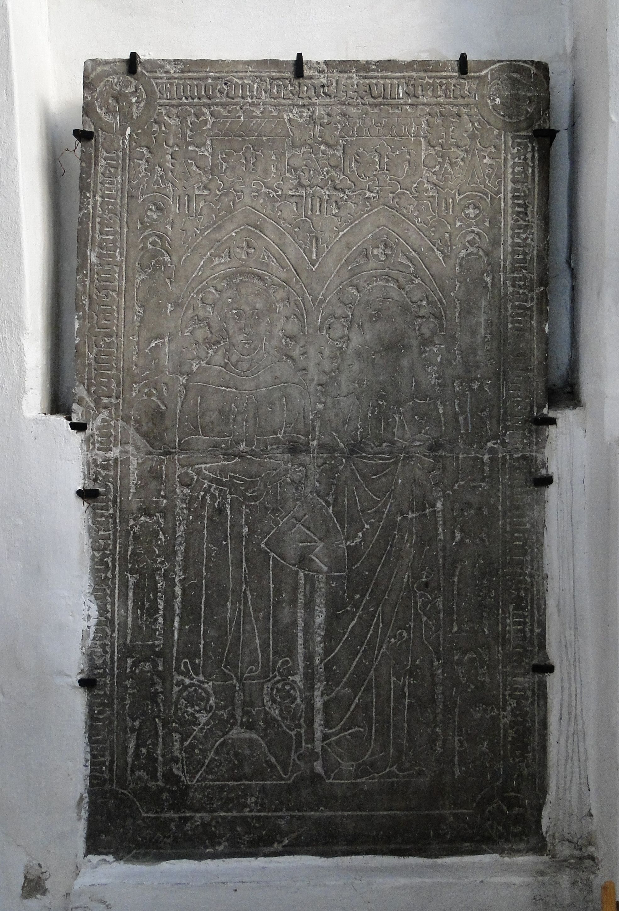 Kościół św. Jana Ewangelisty w Szczecinie - płyta nagrobna Henryka i Gertrudy Rabenstorpów